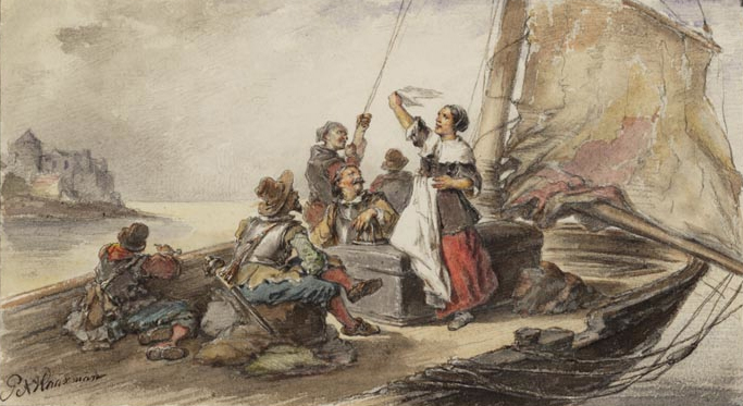 Elsje van Houwening op de Gorkummer beurtman 1620 in: album amicorum aangeboden aan A.L.G. Bosboom-Toussaint